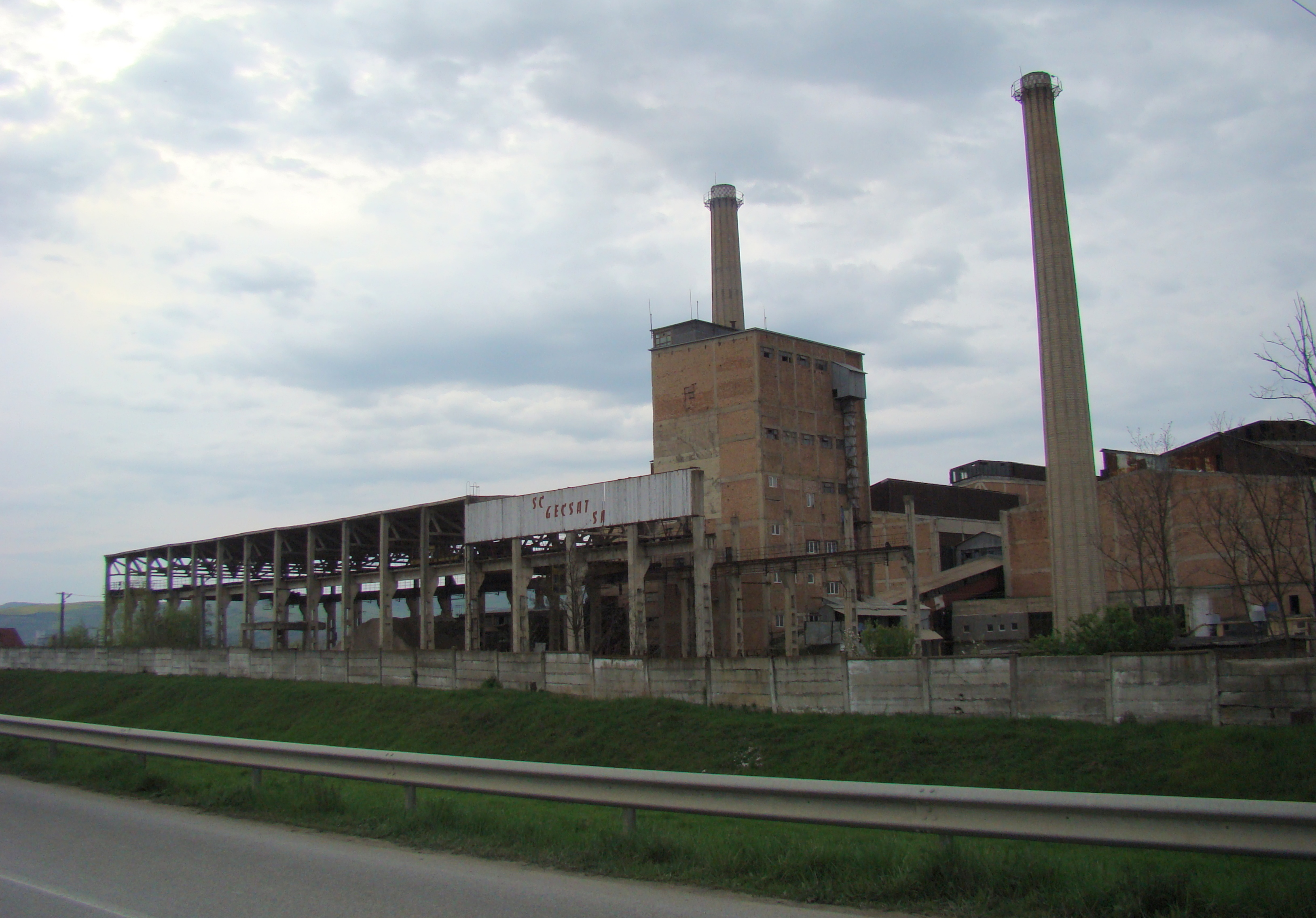 Fosta fabrică de geamuri Târnăveni (înființată în anul 1918 sub numele de “Fabrica de sticlă Ardeleana” – societate anonimă Română de Diciosânmărtin – Boziaş)